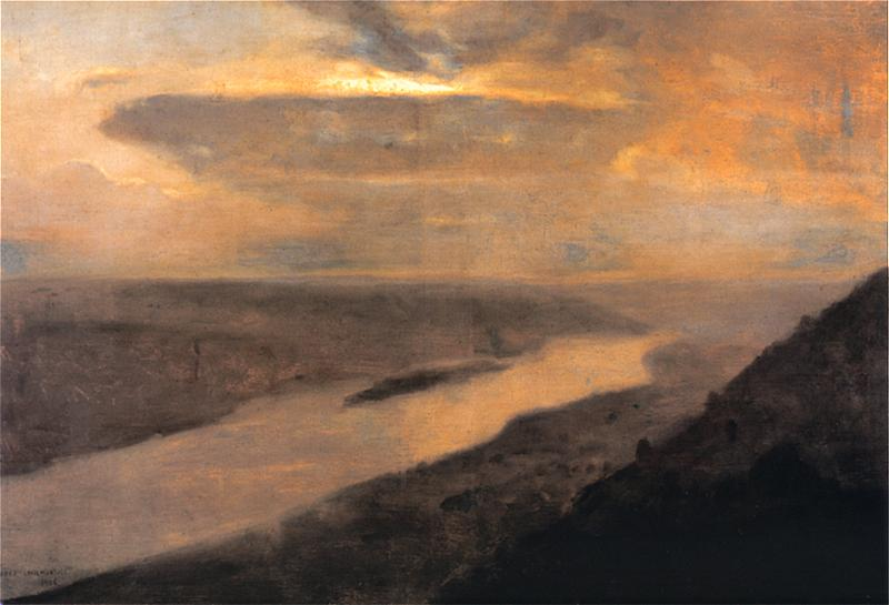 "Dniestr w nocy". Olej na płótnie. 85 × 127 cm. Muzeum Narodowe w Krakowie